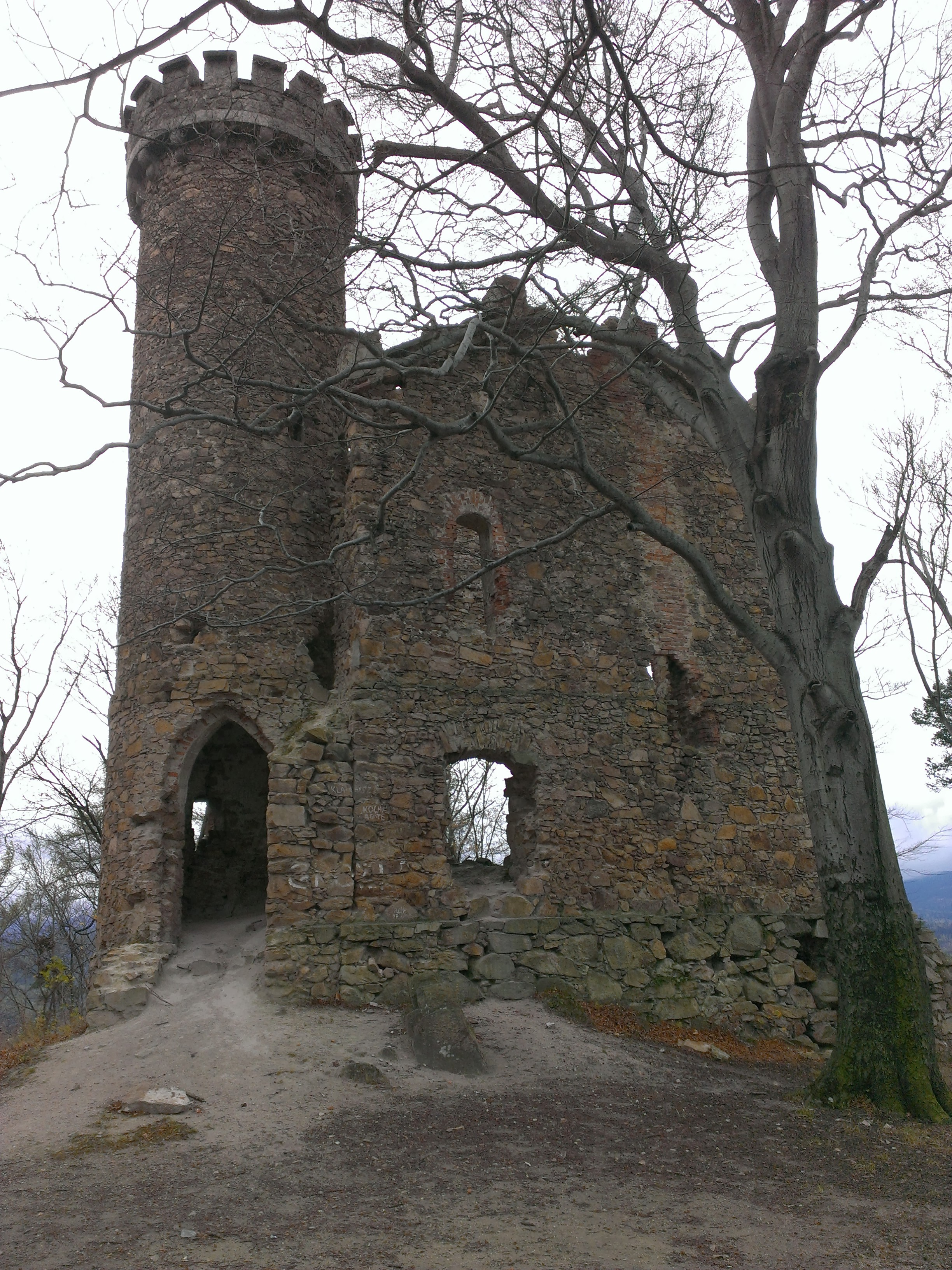 Ruiny zamku księcia Henryka w Marczycach.